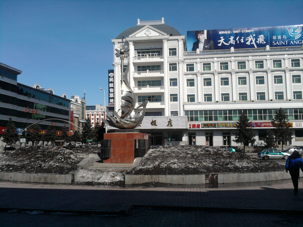 黑龙江大兴安岭地区加格达奇市 站前街